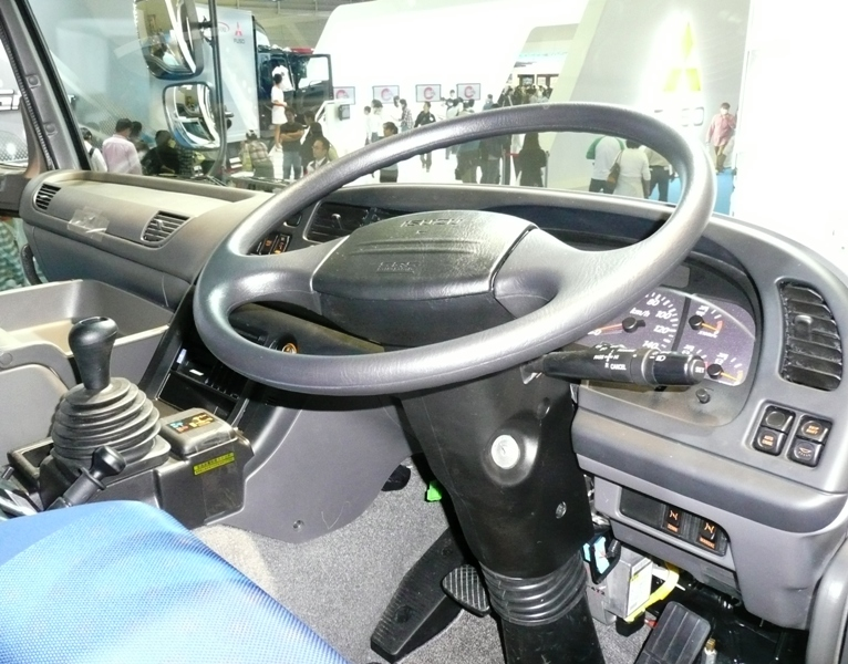 Isuzu Giga interior.